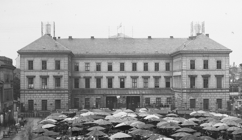 Dresden, Postgebäude am Antonsplatz, Albert Geutebrück und Joseph Thürmer, erbaut 1830 bis 1832